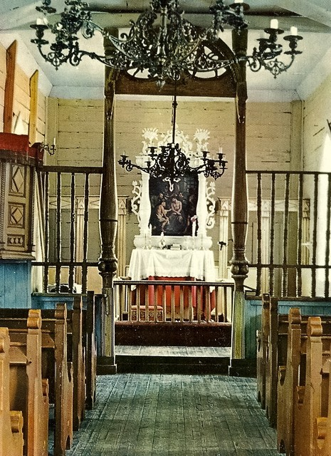 Karasjok gamle kirke